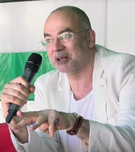 Guillem Martínez.